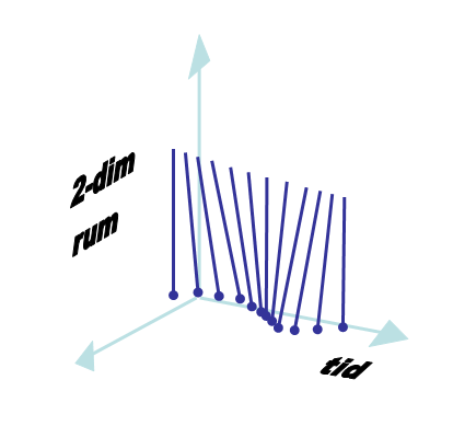 En schematisk bild över en pendel som svänger fram och tillbaka i rumtiden. Skapad av Kjell André 3 juli 2005 kl.16.32 (CEST).